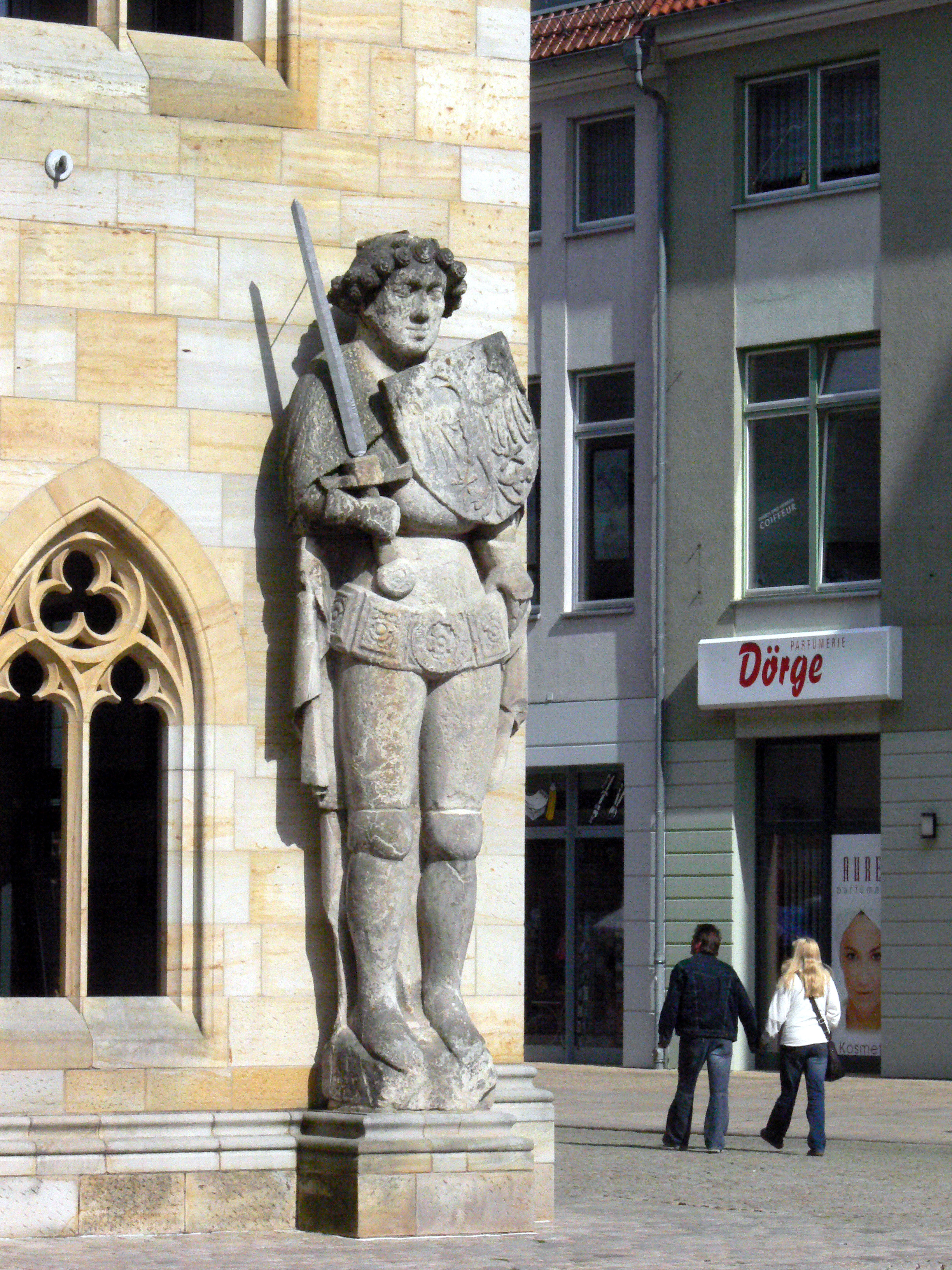 Roland am Rathaus in Halberstadt.